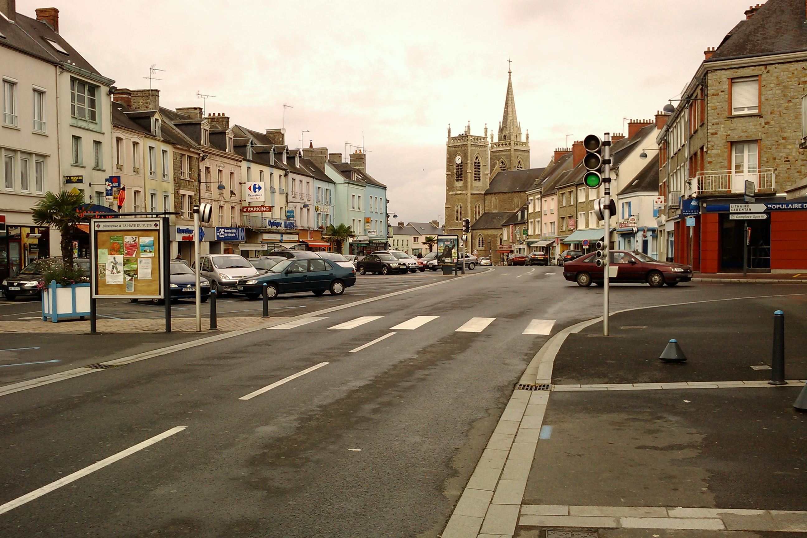 La Haye-du-Puits, MAnche